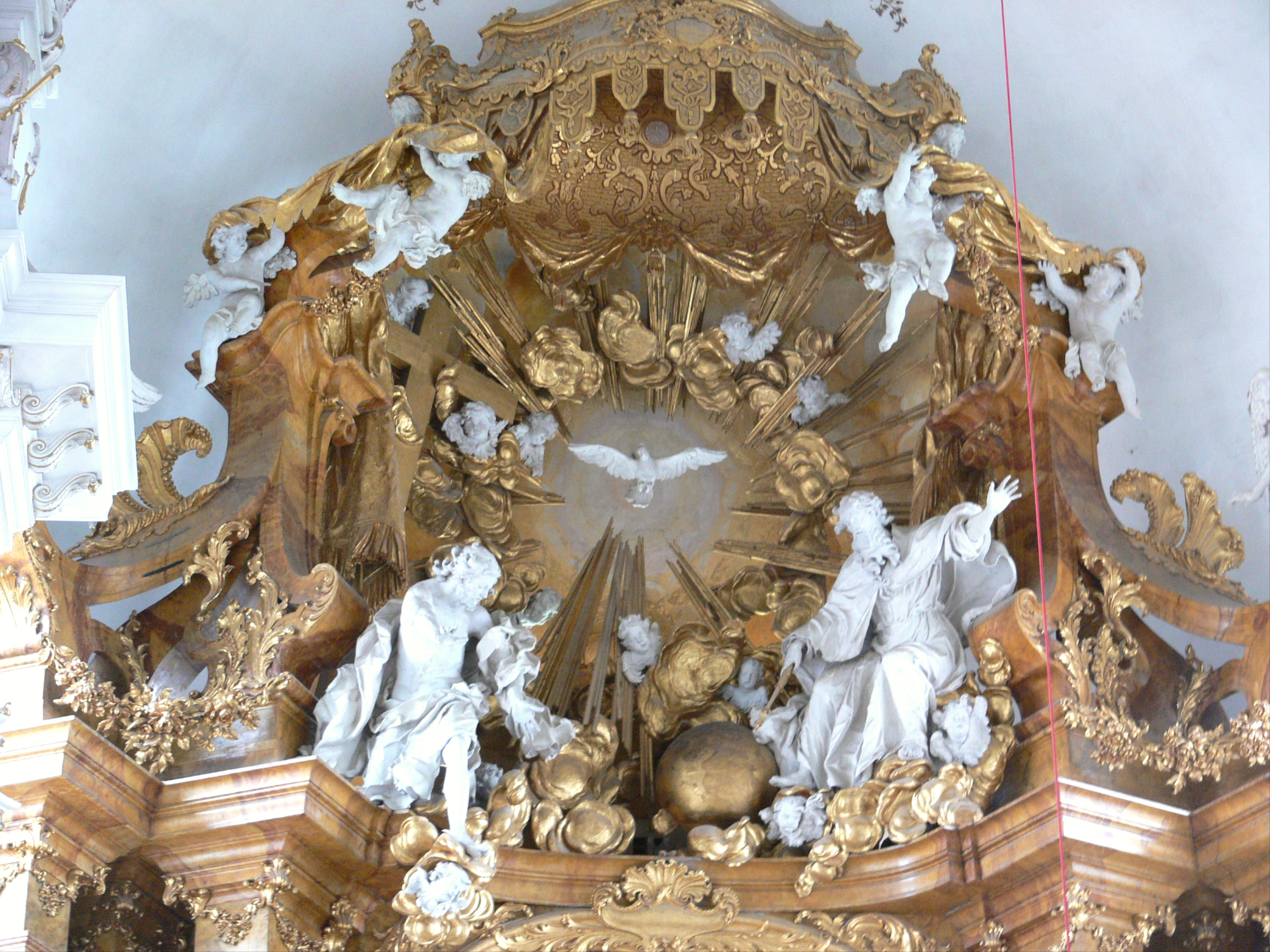 Marienmünster Dießen (ehem. Augustiner-Chorherren-Kirche Mariä Himmelfahrt, heute Pfarrkirche, Dießen am Ammersee) Hochaltar, Altarauszug mit Darstellung der Hl. Dreifaltigkeit (Joachim Dietrich zugeschrieben) Joachim Dietrich (1690–1753) Alternative namesDietrich, Johann JoachimDescriptionGerman sculptorDate of birth/death16901753Location of birth/deathTheilenberg (bei Spalt)MunichWork locationMunichAuthority control VIAF: 40172453 ULAN: 500055280 RKD: 114689